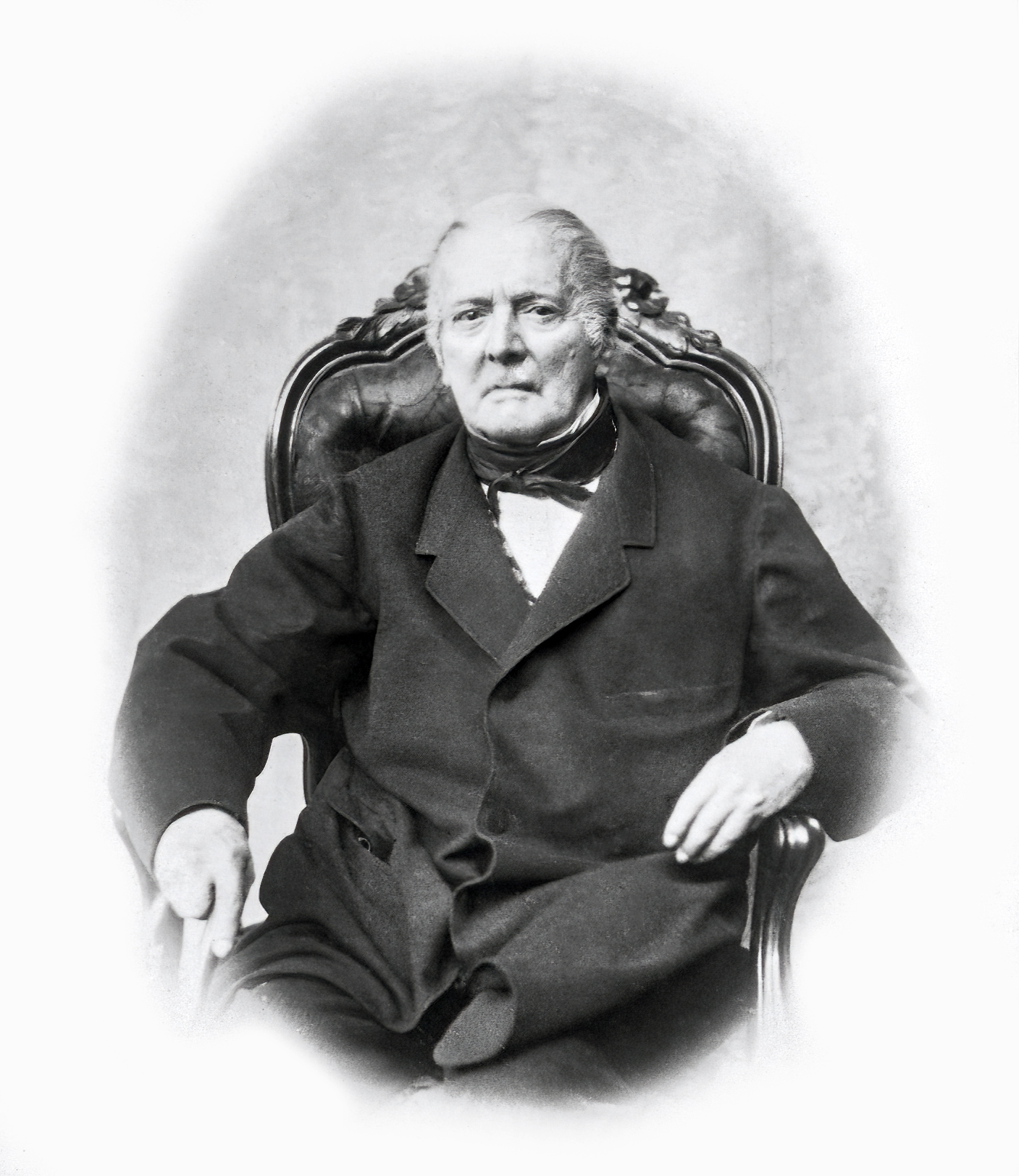 Andrés Bello, fue un filósofo, poeta, filólogo, educador y jurista venezolano, considerado como uno de los humanistas más importantes de América.